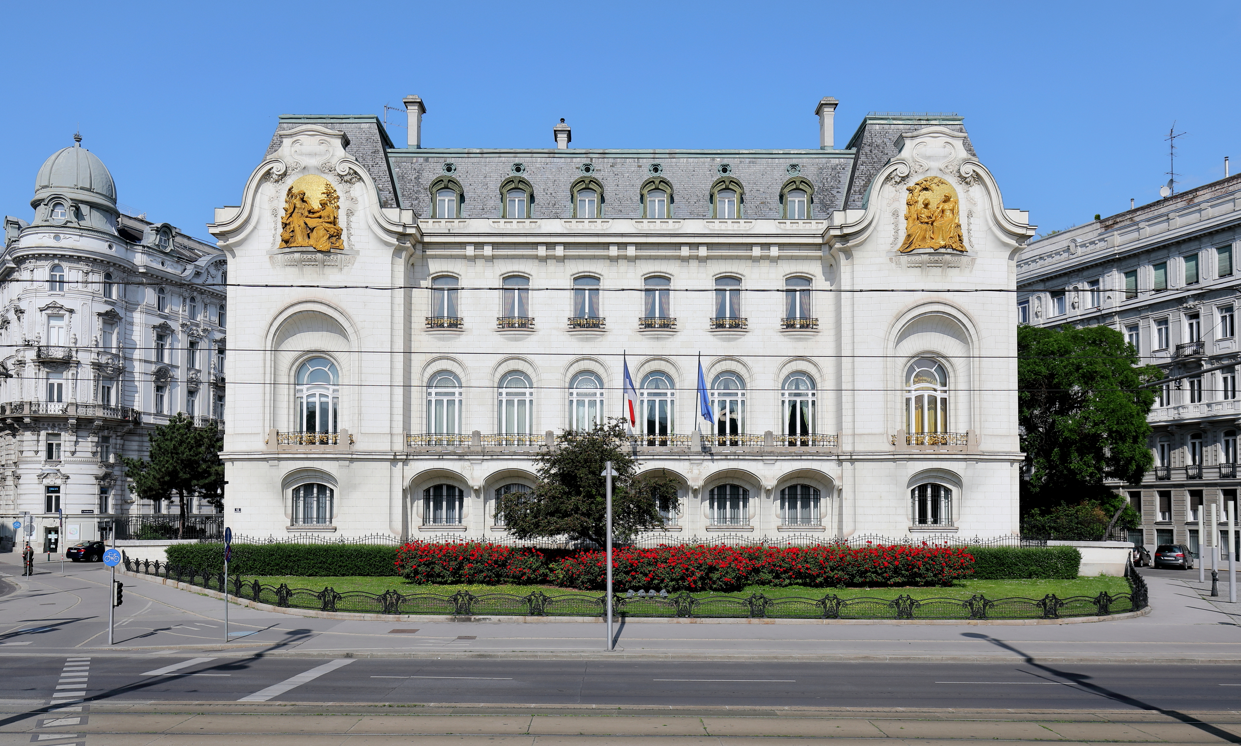 Die Französische Botschaft am Schwarzenbergplatz im 4. Wiener Gemeindebezirk Wieden. Das Palais wurde von 1904 bis 1912 nach Plänen des Chefarchitekten des französischen Außenministeriums Georges-Paul Chédanne erbaut.